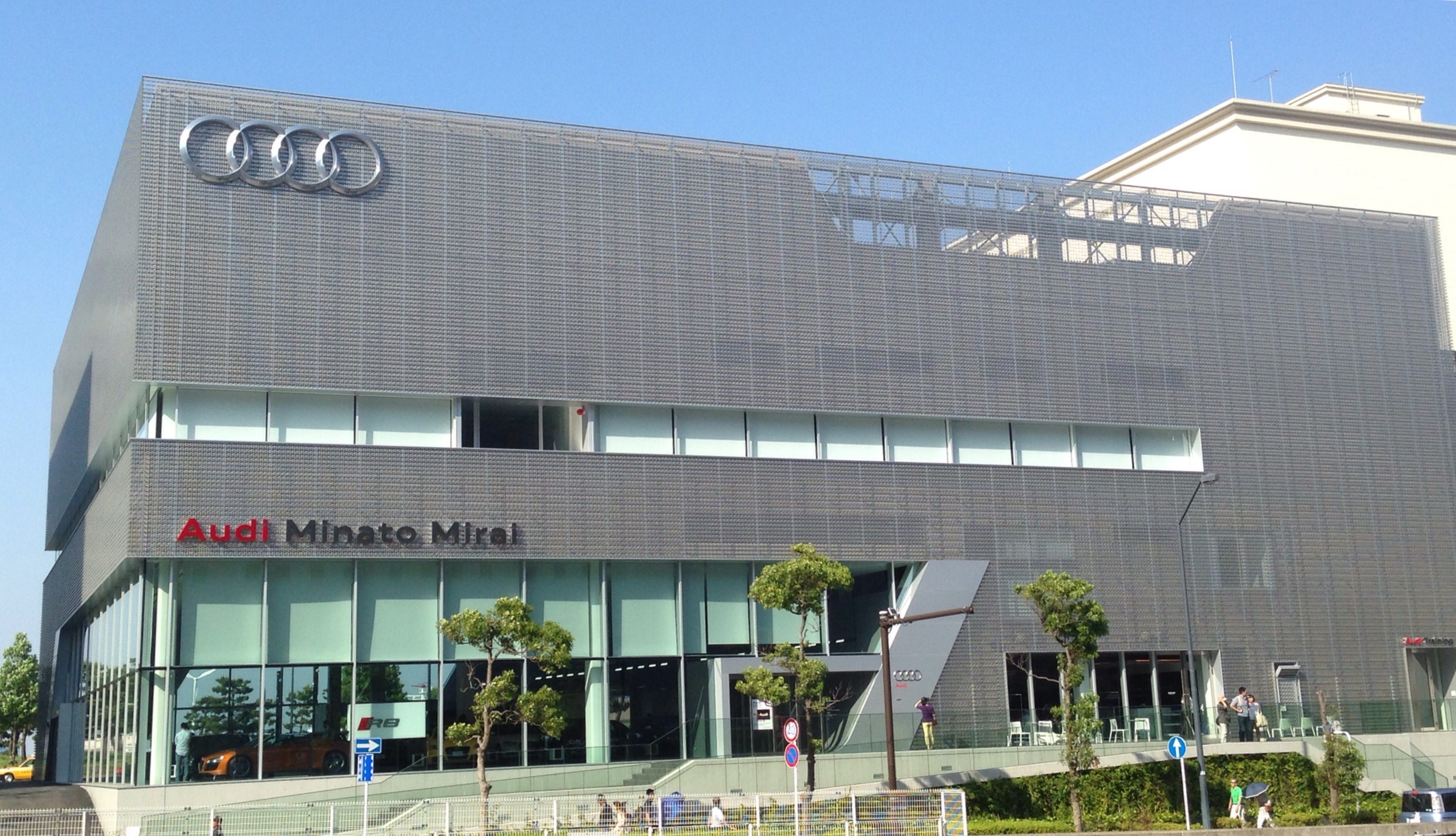 アウディみなとみらいの外観（南側）。